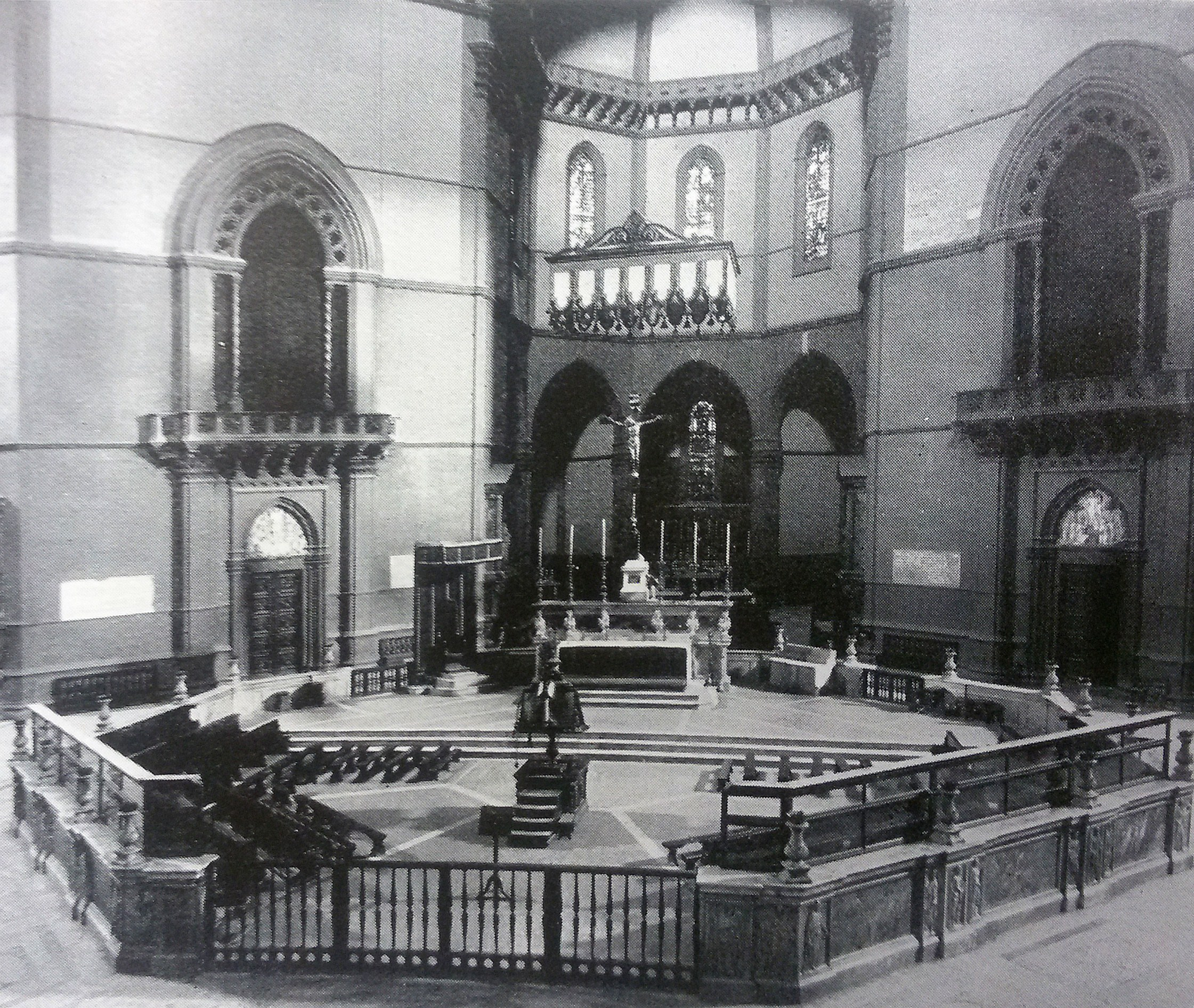 Veduta del coro in una fotografia scattata tra il 1850 e il 1918.